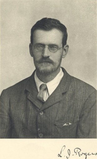 Foto di Leonard James Rogers